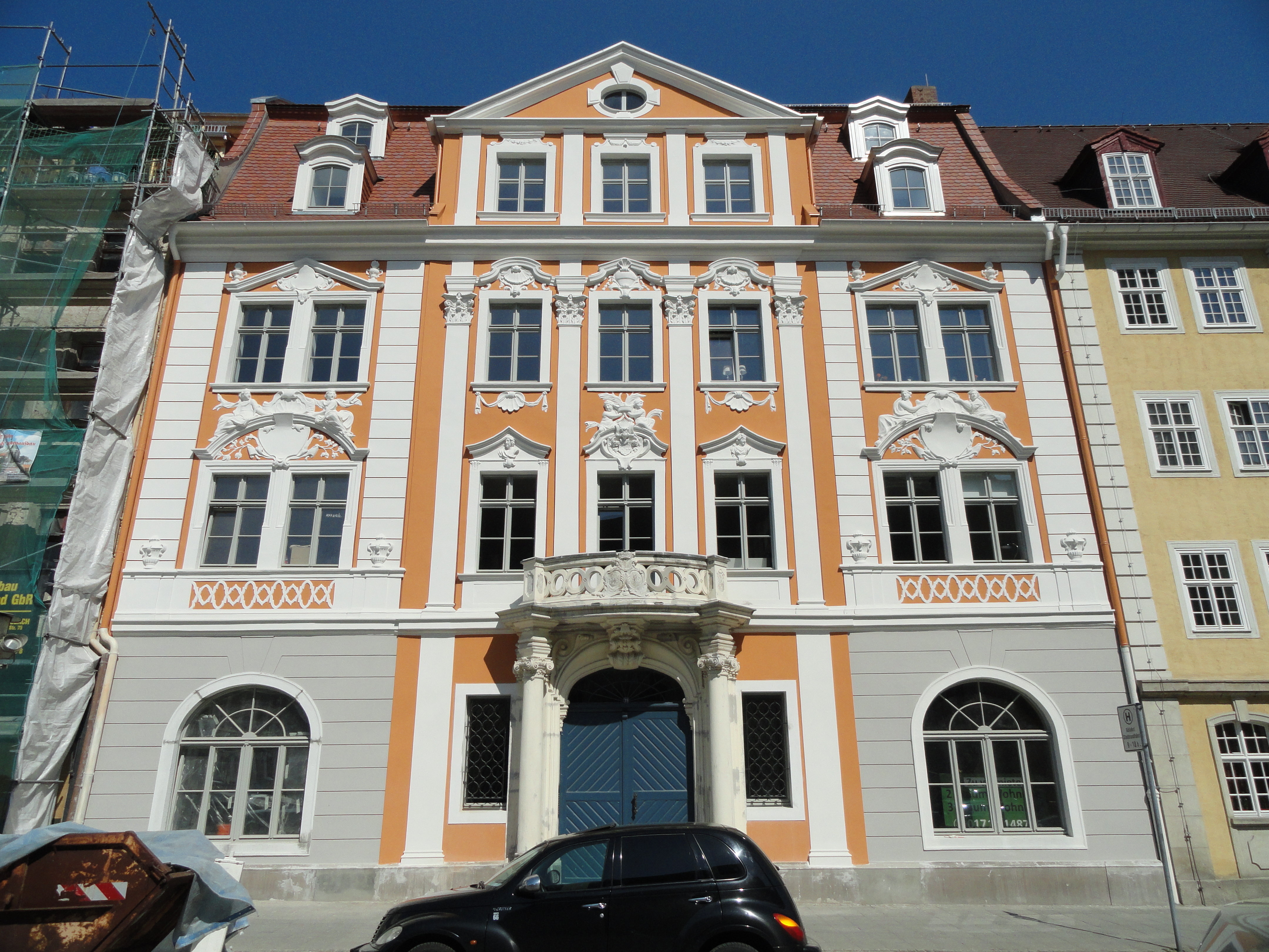 Das Napoleonhaus auf dem Obermarkt in Görlitz. (Obermarkt 29)